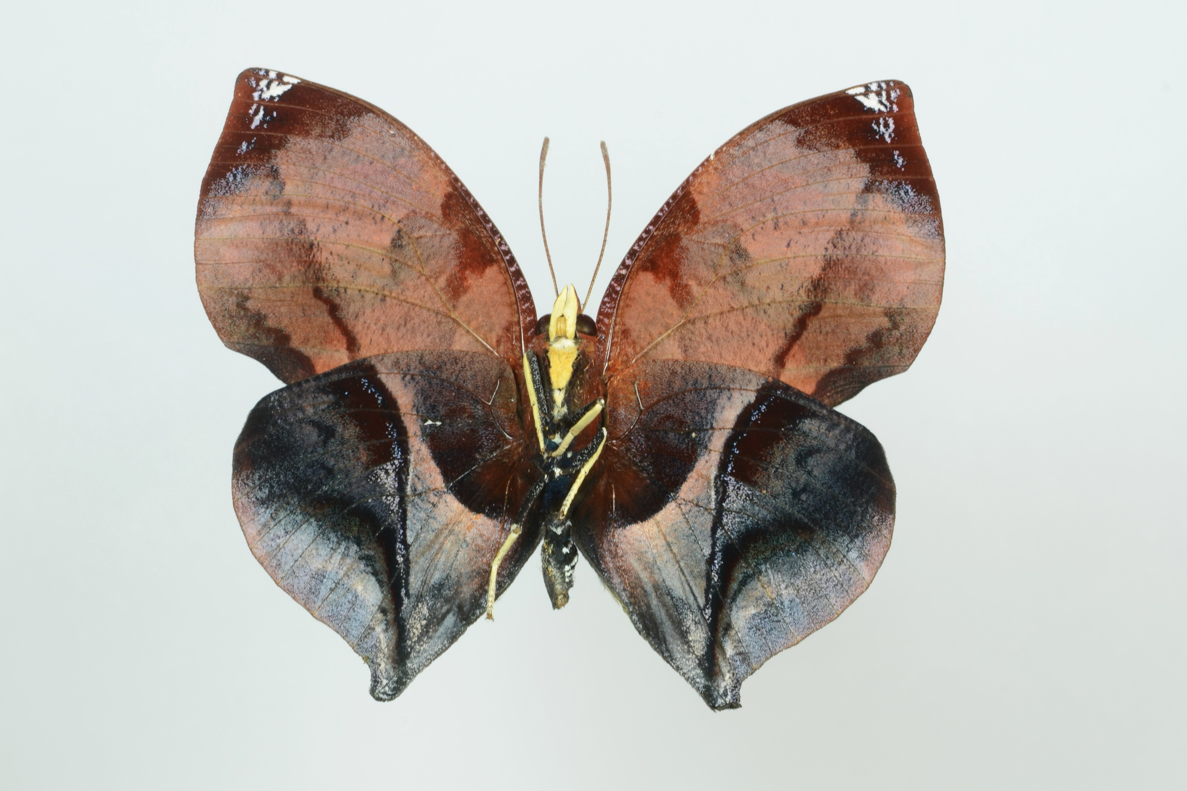 Siderone galanthis ventral Ecuador